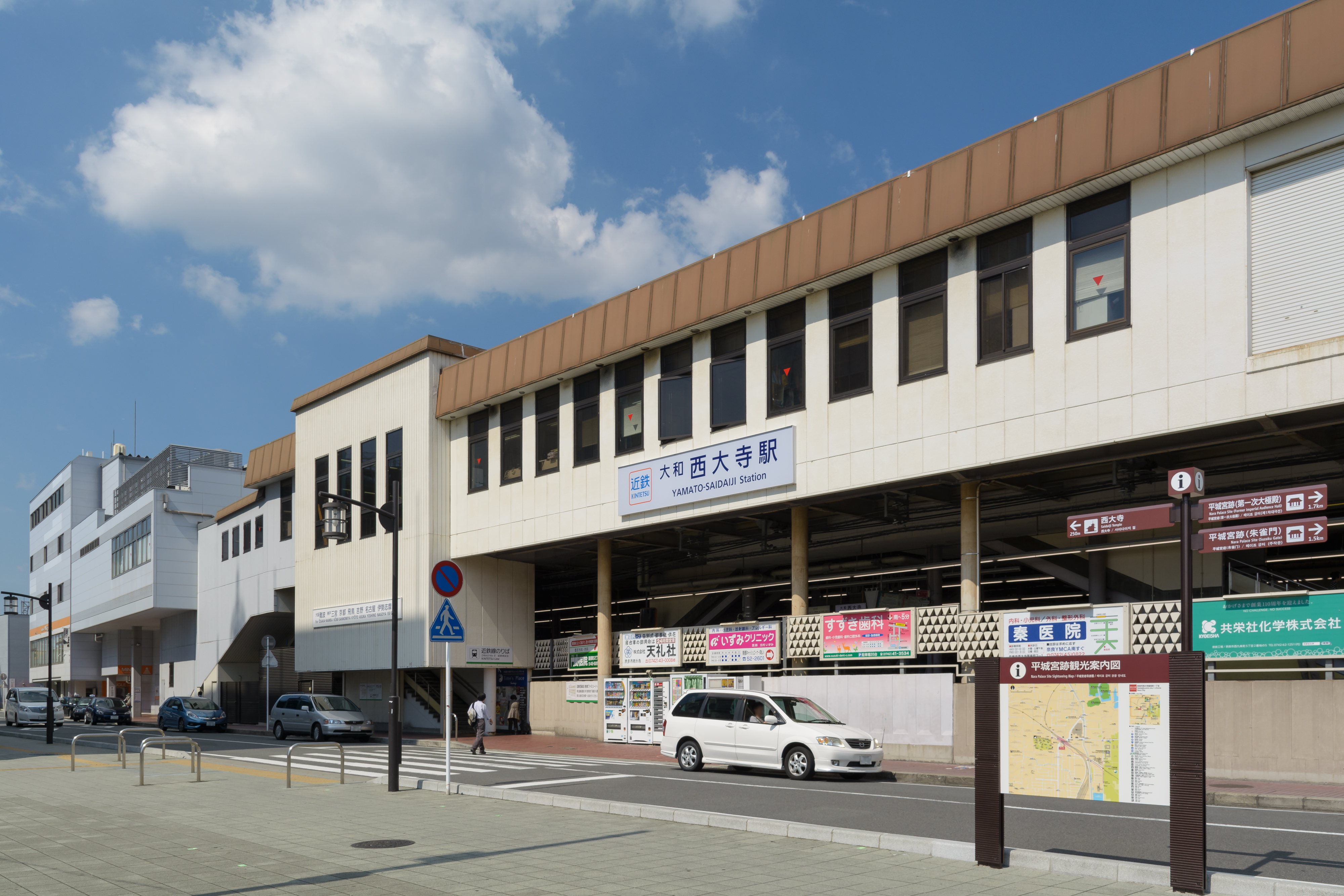 近鉄大和西大寺駅南口